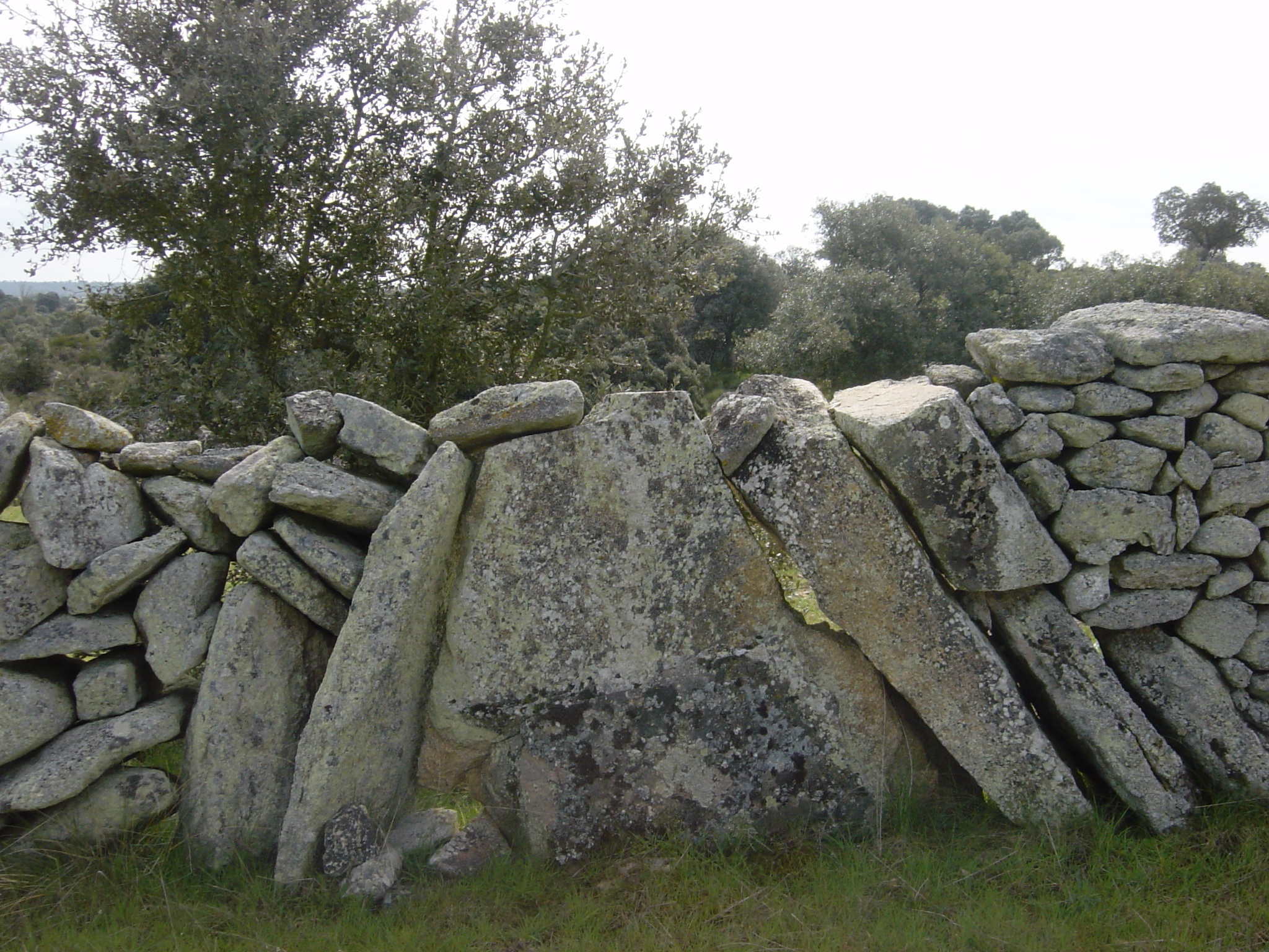 CERCA DE PIEDRA EN PEÑAUSENDE, ESPAÑA